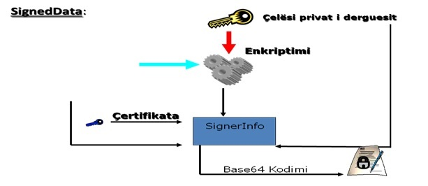 Nenshkrimi i të dhënave